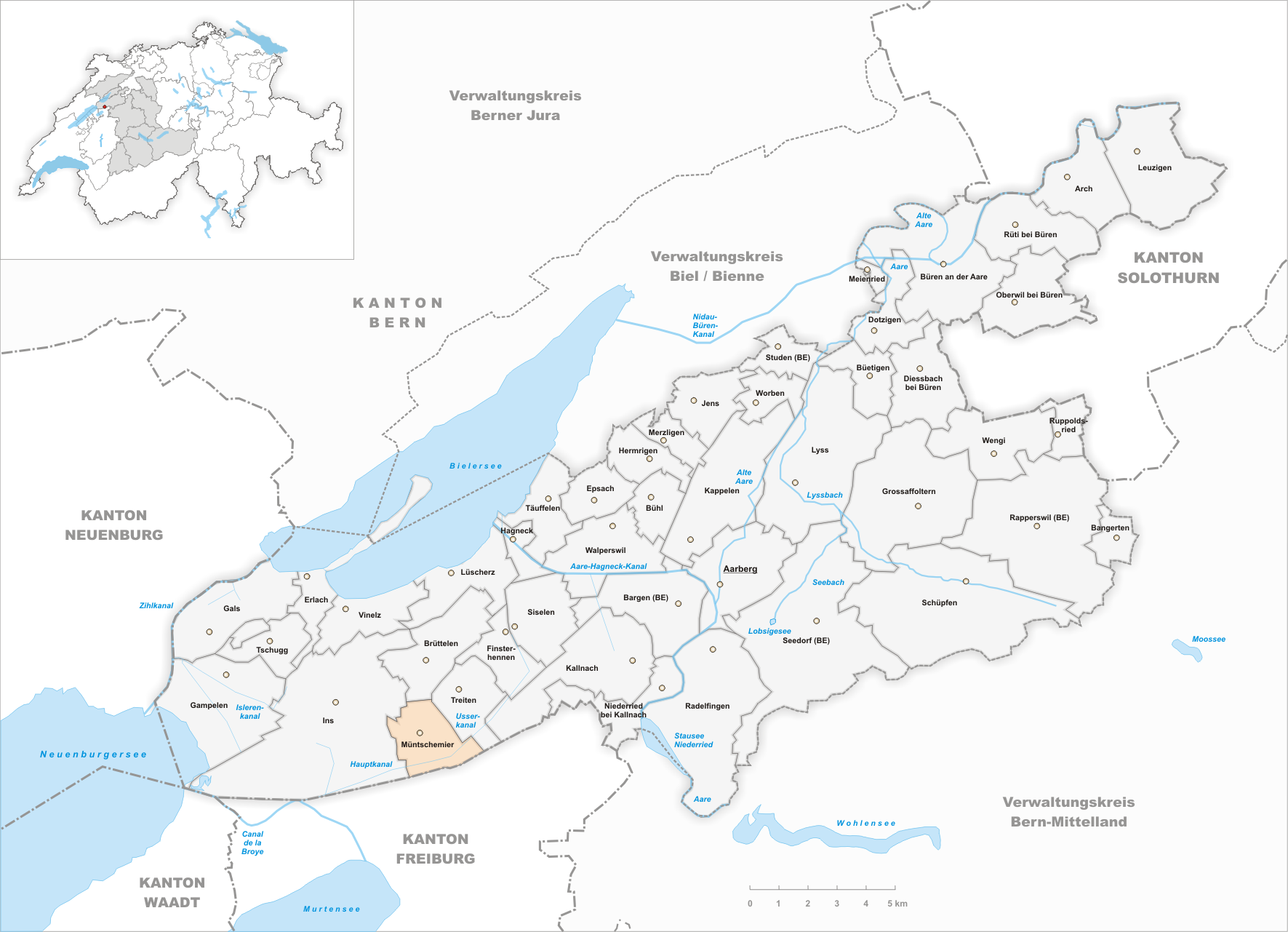 Municipality Müntschemier